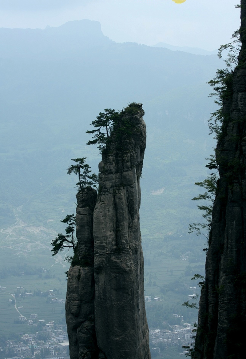 恩施大峡谷3